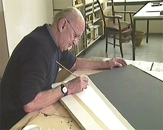 Portrait de Jean Leppien